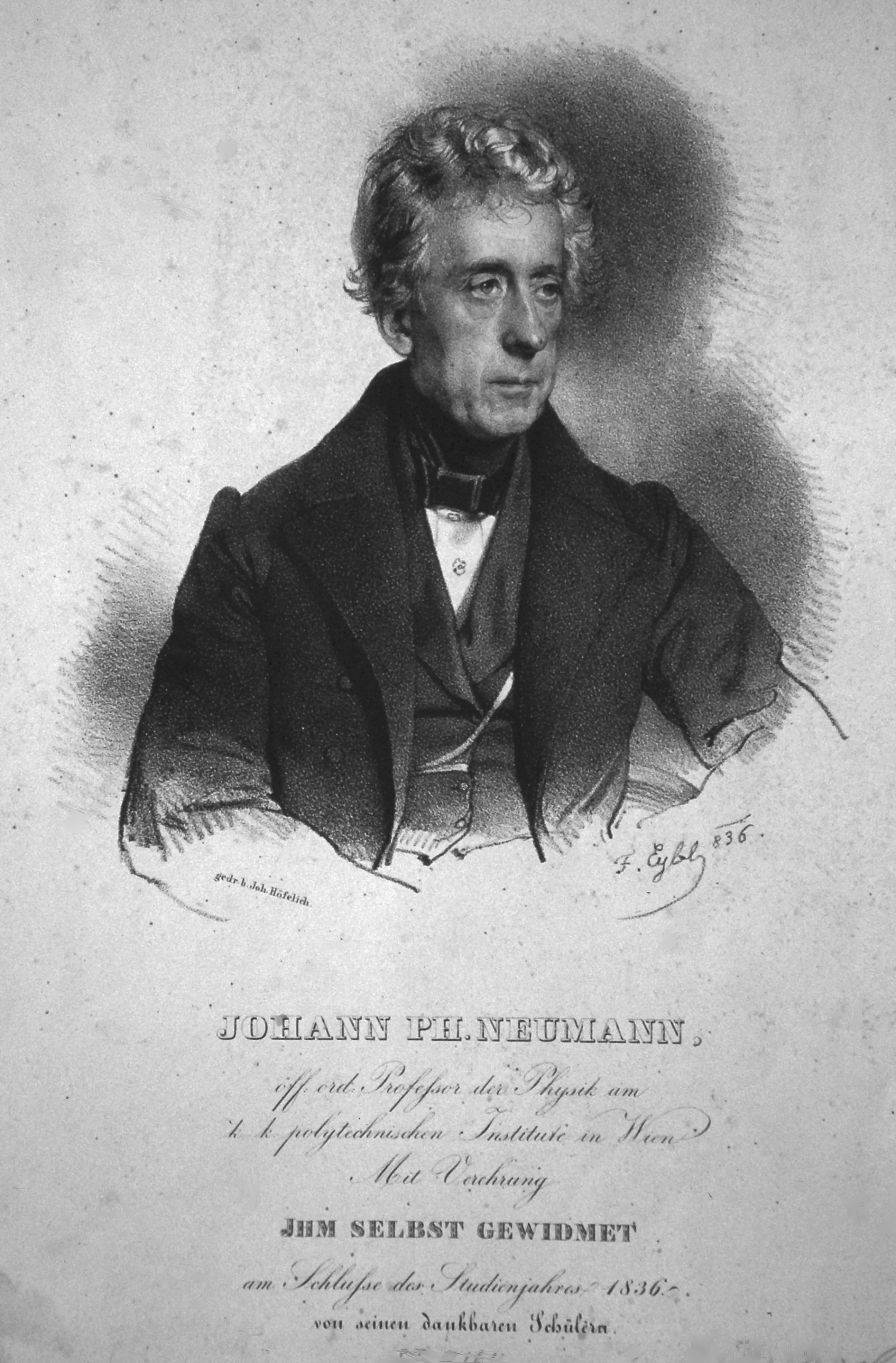 Johann Philipp Neumann (1774-1849), östererichischer Physiker. Lithographie von Franz Eybl, 1836